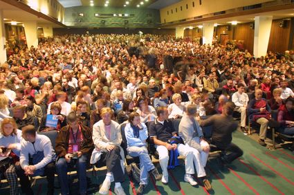 Publika u Kinu SC - ZFF